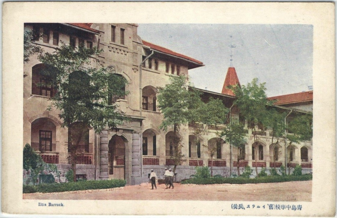 青岛旭兵营，原德军伊尔蒂斯兵营